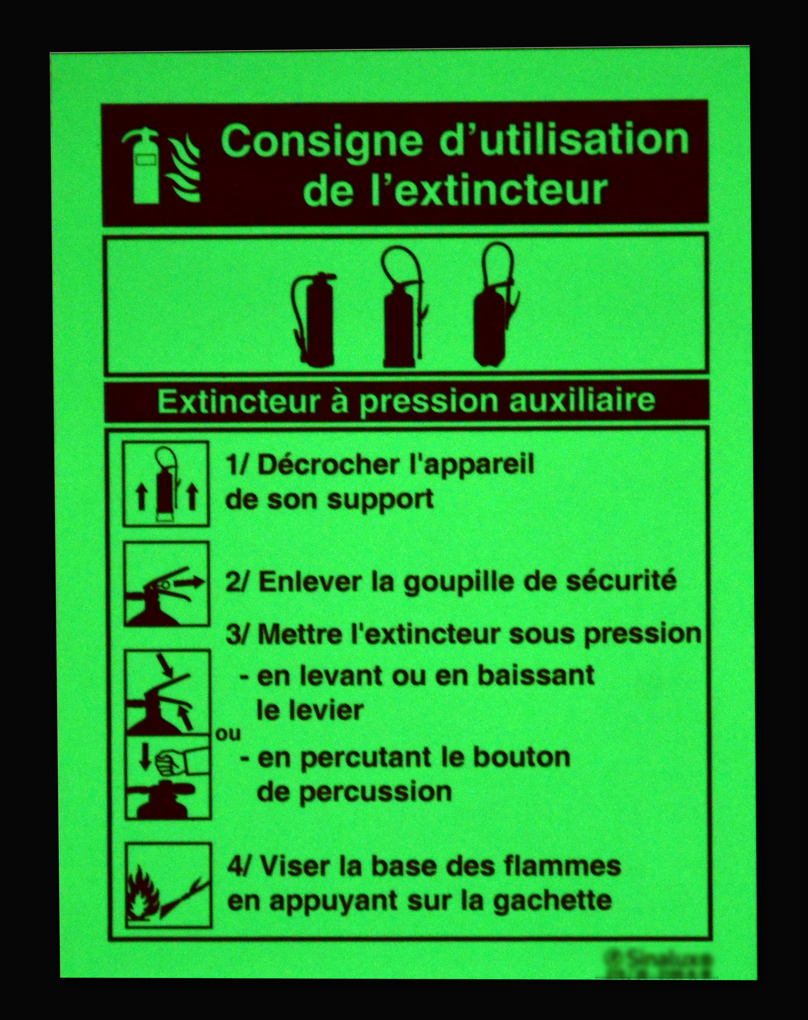 Panneau luminescent utilisé pour la signalétique sécurité-Incendie. Après avoir été éclairé, le panneau reste visible et lisible dans le noir en cas de panne de courant. Ce type de panneau est apposé sur le mur au dessus d'extincteurs Unknown